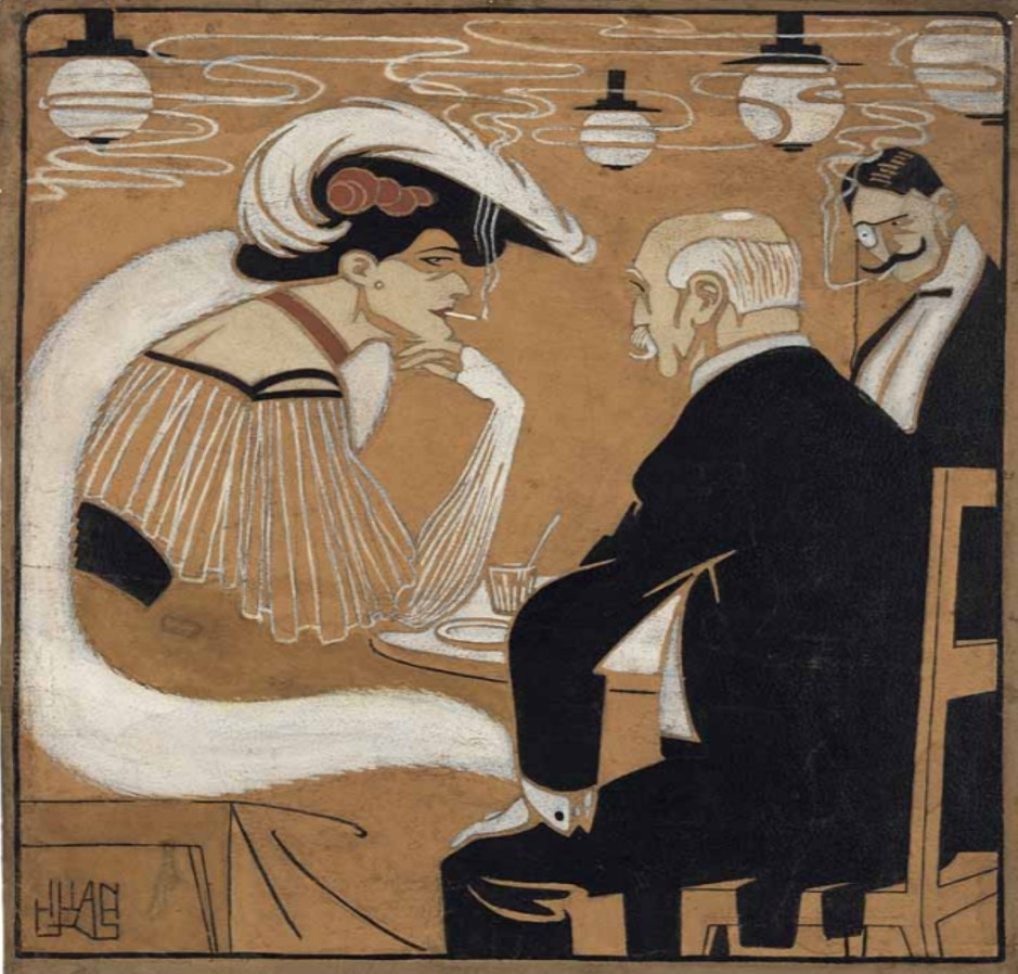 El 1 de mayo en el Kursall, 1907. Ilustración firmada por Juan Gris, publicada en la portada del número 8 de la revista madrileña ¡Alegría! (1 de mayo de 1907).